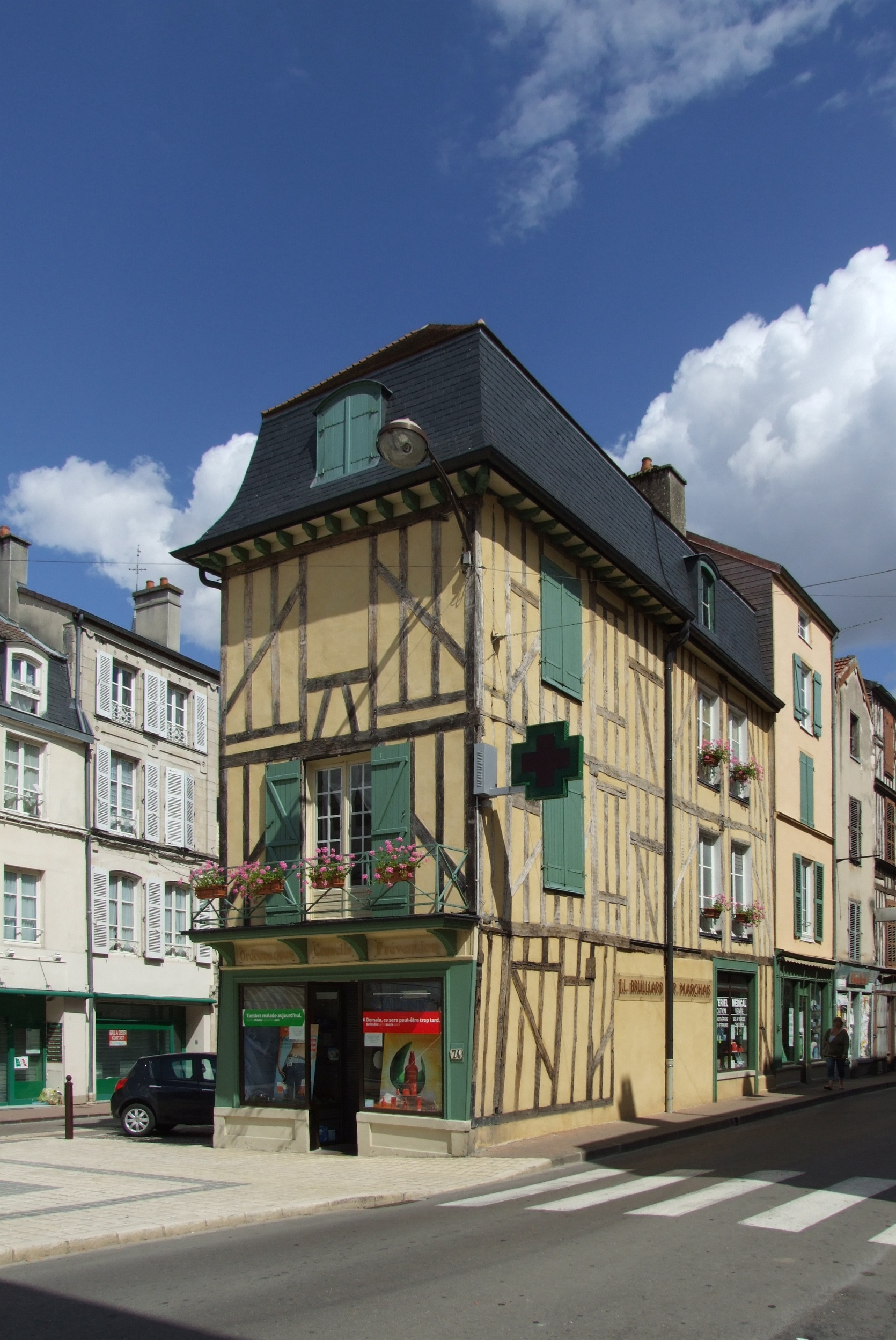 Bar-sur-Aube, Aube, Champagne-Ardennes, FRANCE